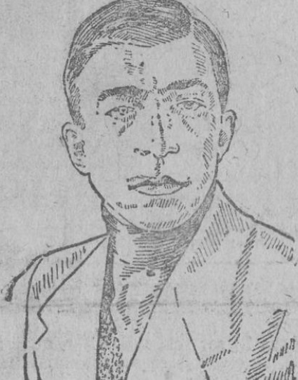 Портрет Федора Корнюшина, секретаря ЦК КП(б)У з першої сторінки газети Харьковский пролетарий від 16.12.1925. Автор портрету в газеті не вказаний.